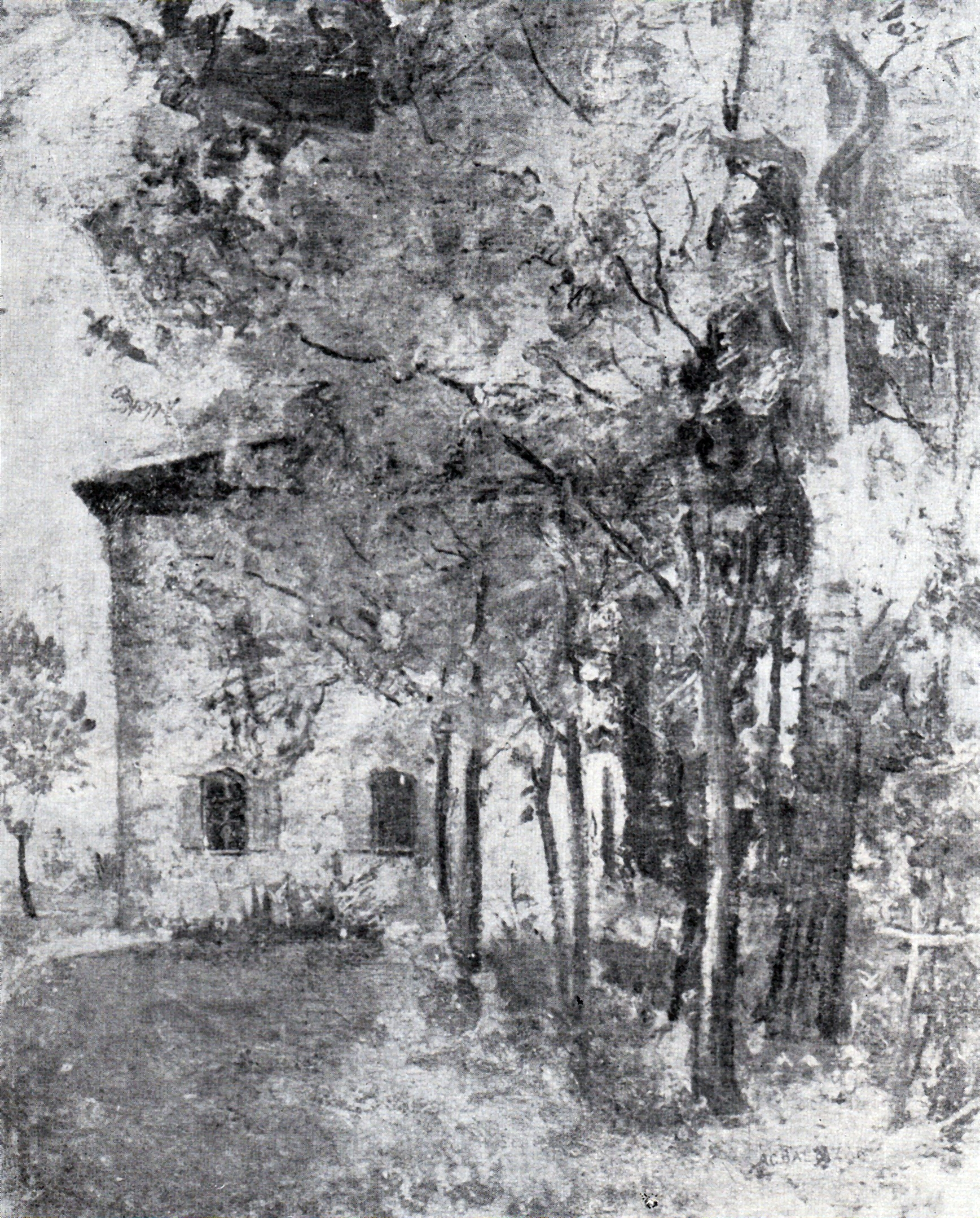 Peisaj de la Ruginoasa